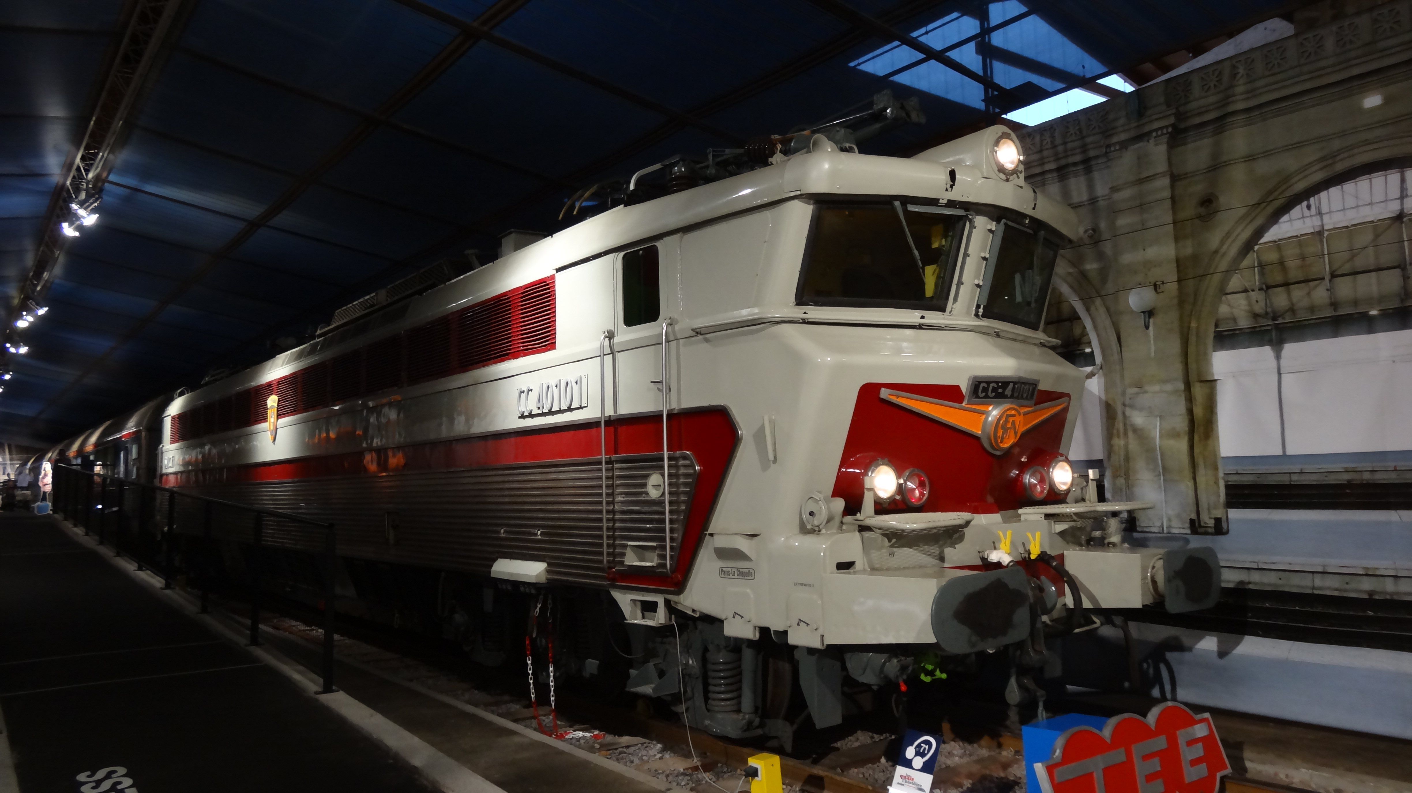 Cite du Train Mulhouse 2014 163